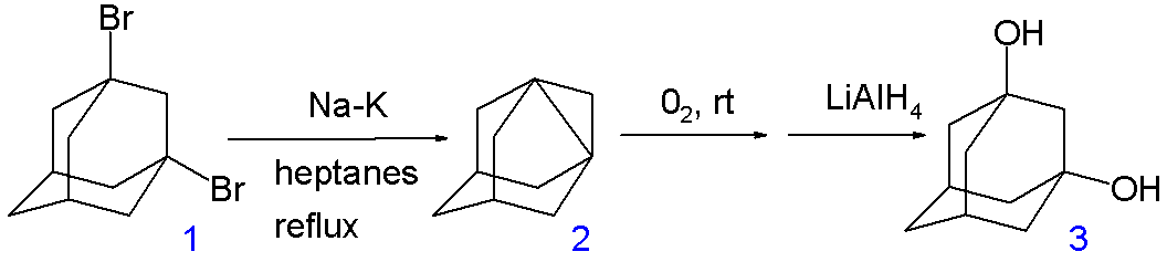 1,3-dehydroadamantane